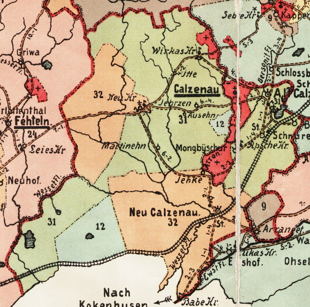 Kalsnava kihelkonna mõisad 1903. aasta kaardil.